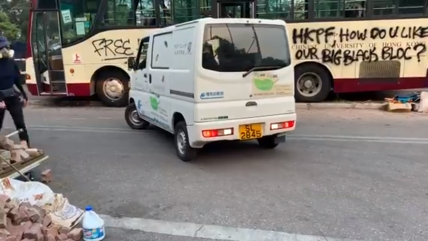 香港中文大学内的各类校内车辆均已被示威者征用，校内巴士被用来当作临时休息站，电动小客车用来运送补给物资，中型巴士运人运物。